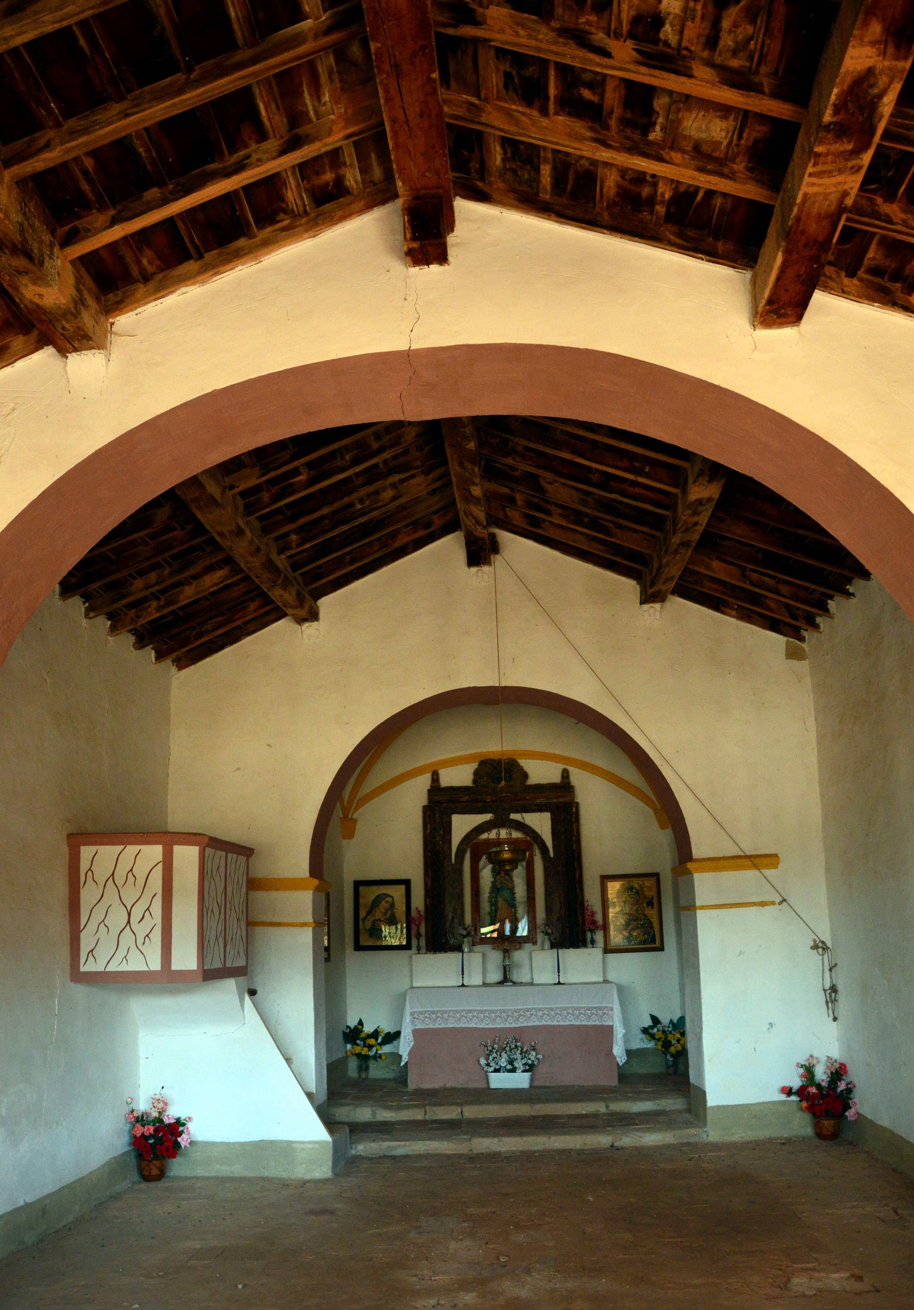 Nave de la Ermita de la Purísima en Puebla de San Miguel (Valencia), con el presbiterio al fondo (2018).